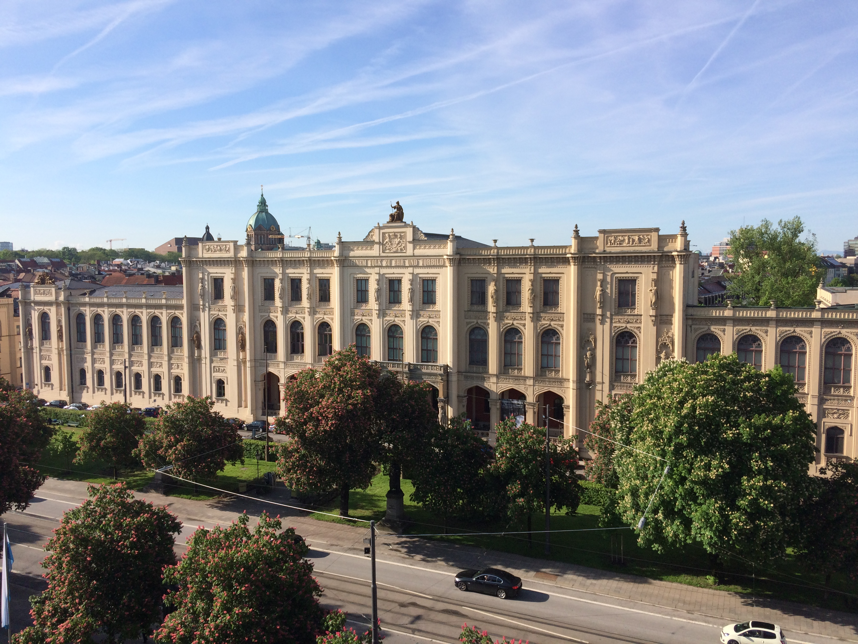 Museum Fünf Kontinente im Mai 2017